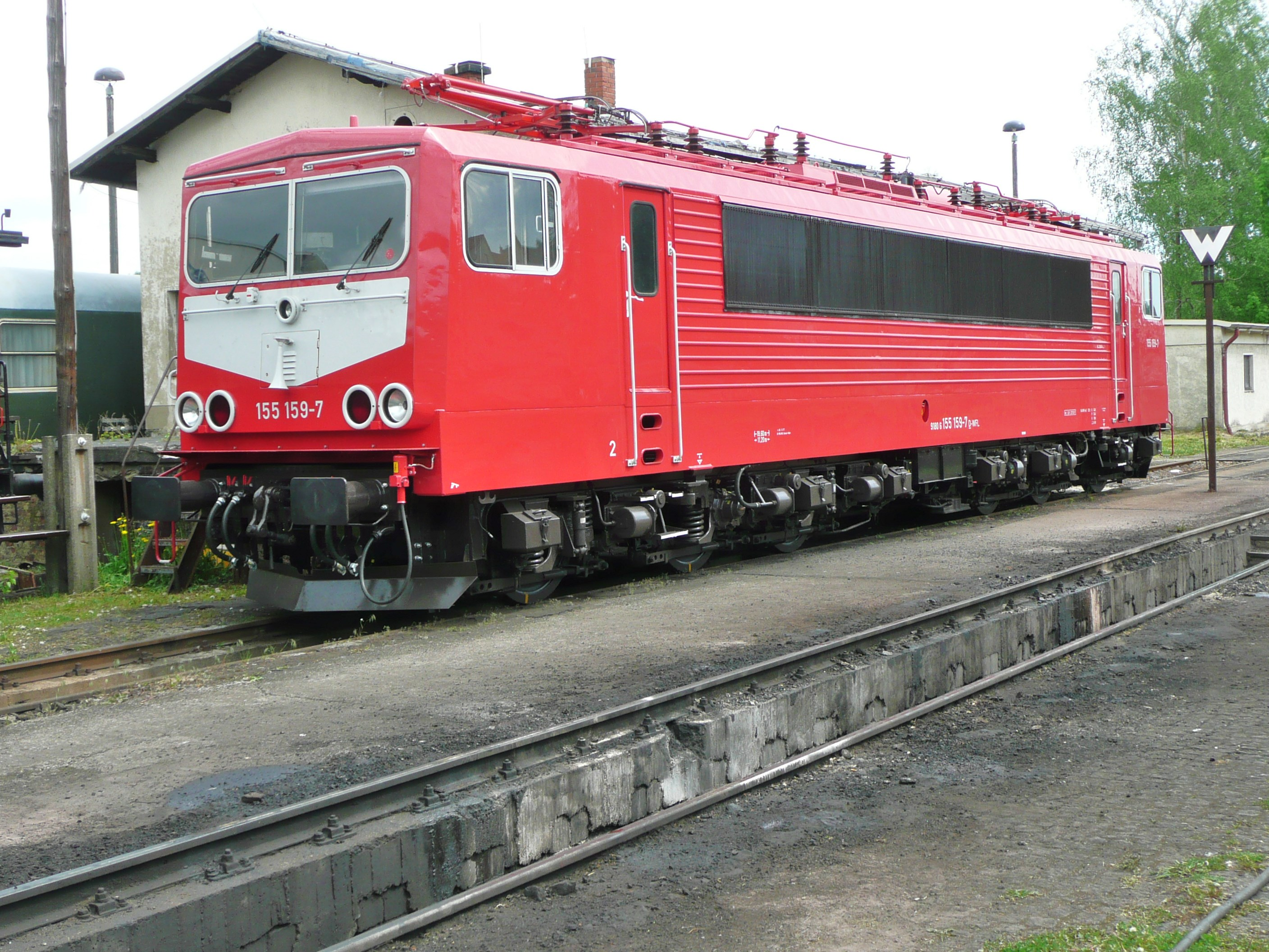 155 159 der WFL zum Tag der Offenen Tür im Bahnbetriebswerk Nossen